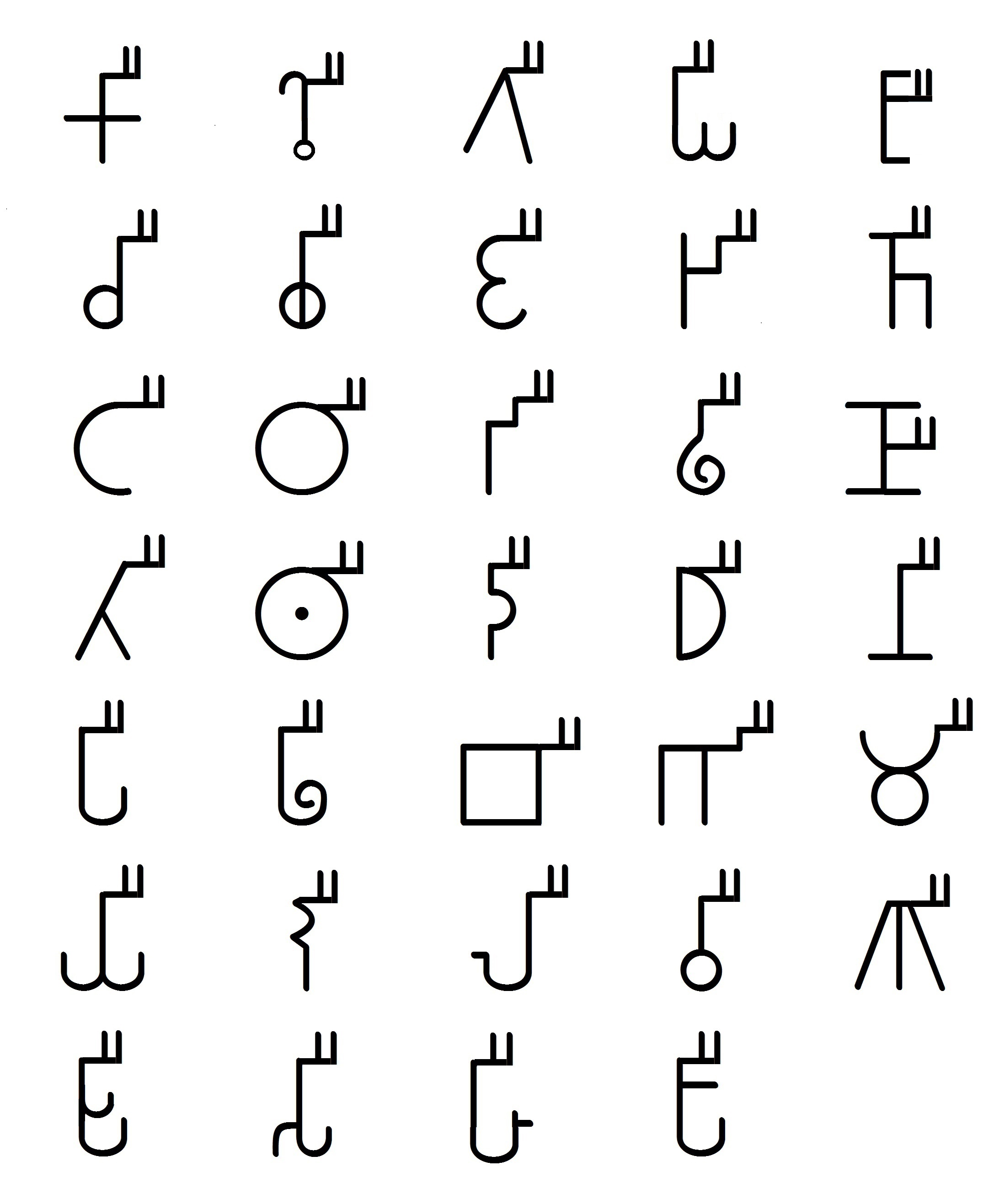 ब्राम्हि व्यंजनांचे ई-कार (दीर्घ वेलांटी)